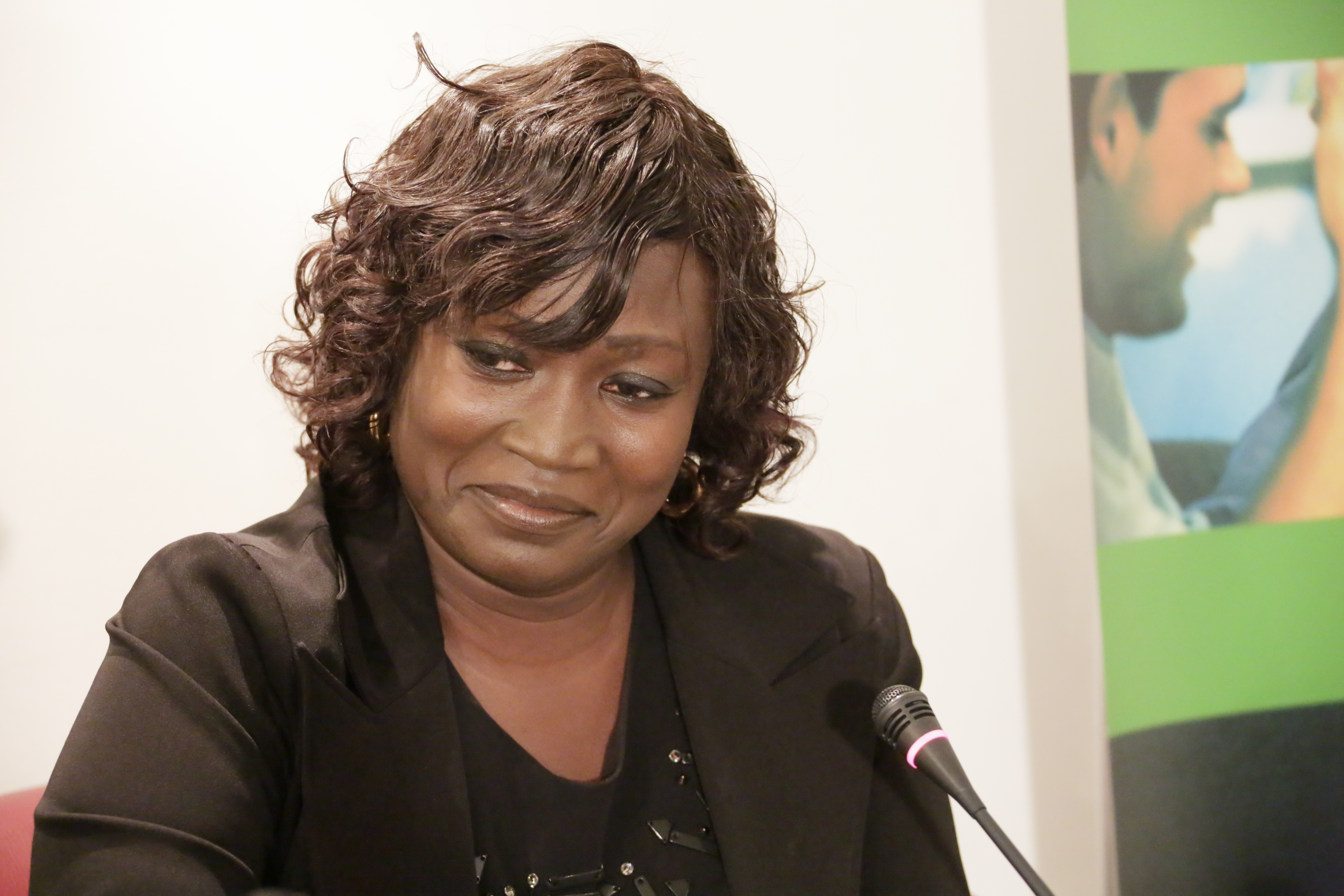 Sokhna Benga lors d'une manifestation « Au cœur de la littérature »